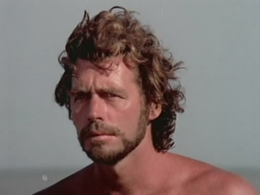 Víctor Bo, actor y director de cine argentino